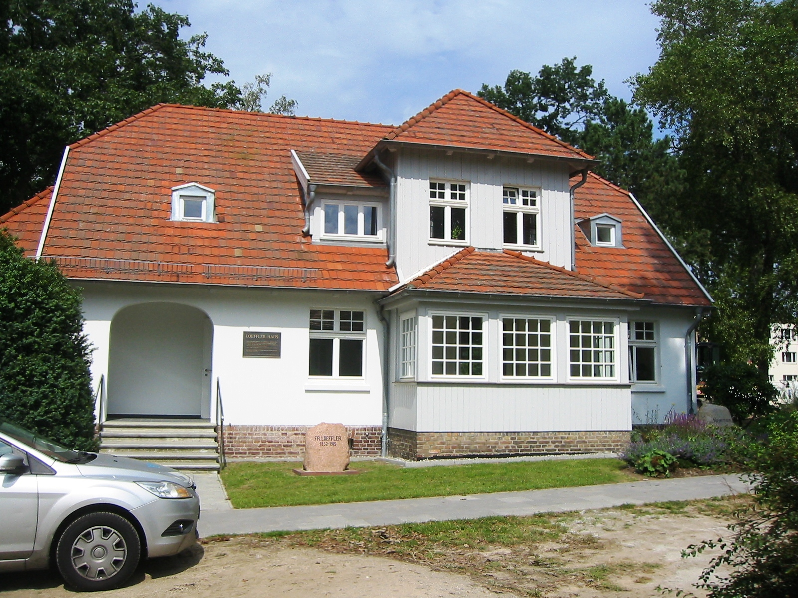 Friedrich-Loeffler-Haus auf der Insel Riems im Landkreis Ostvorpommern